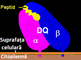 Molecula HLA-DQ